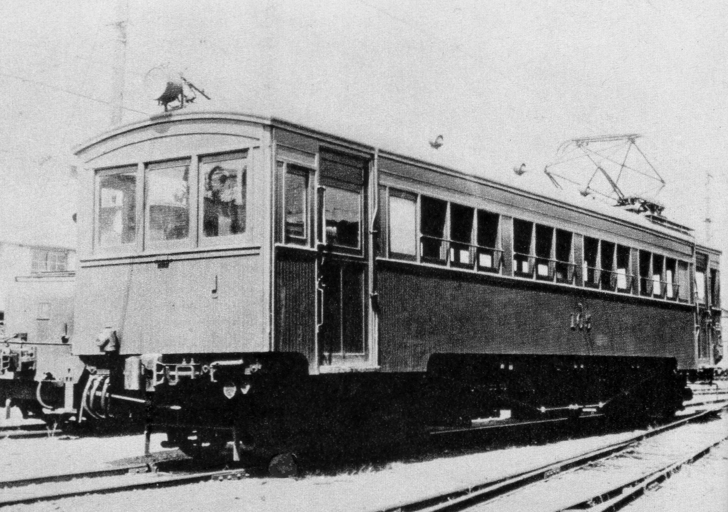 三河鉄道デ100形電車